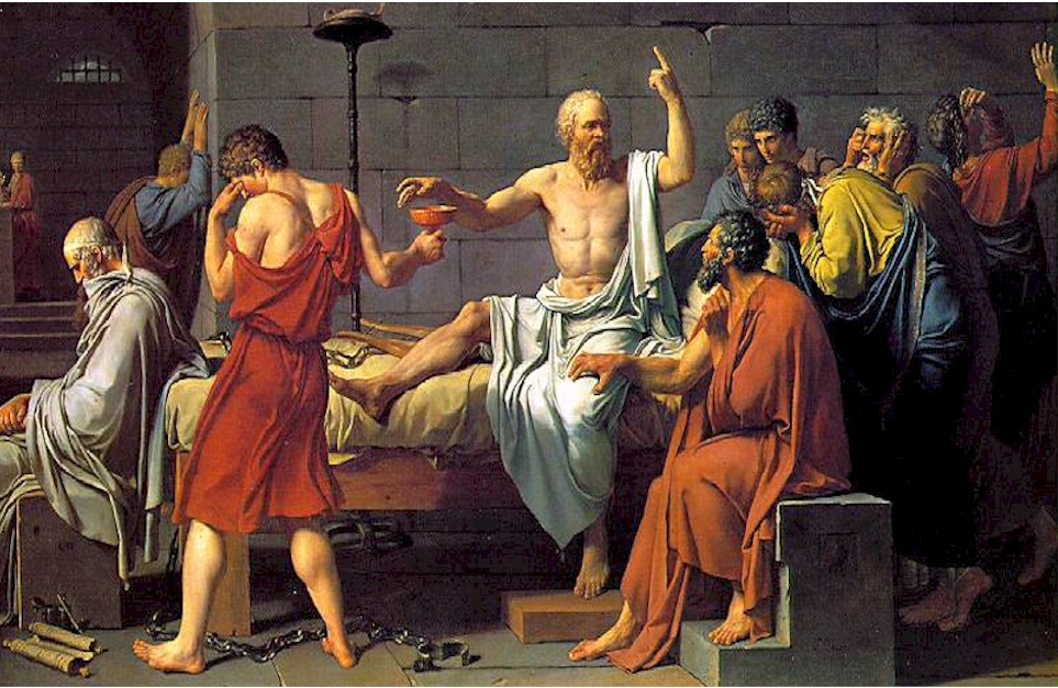 grecia